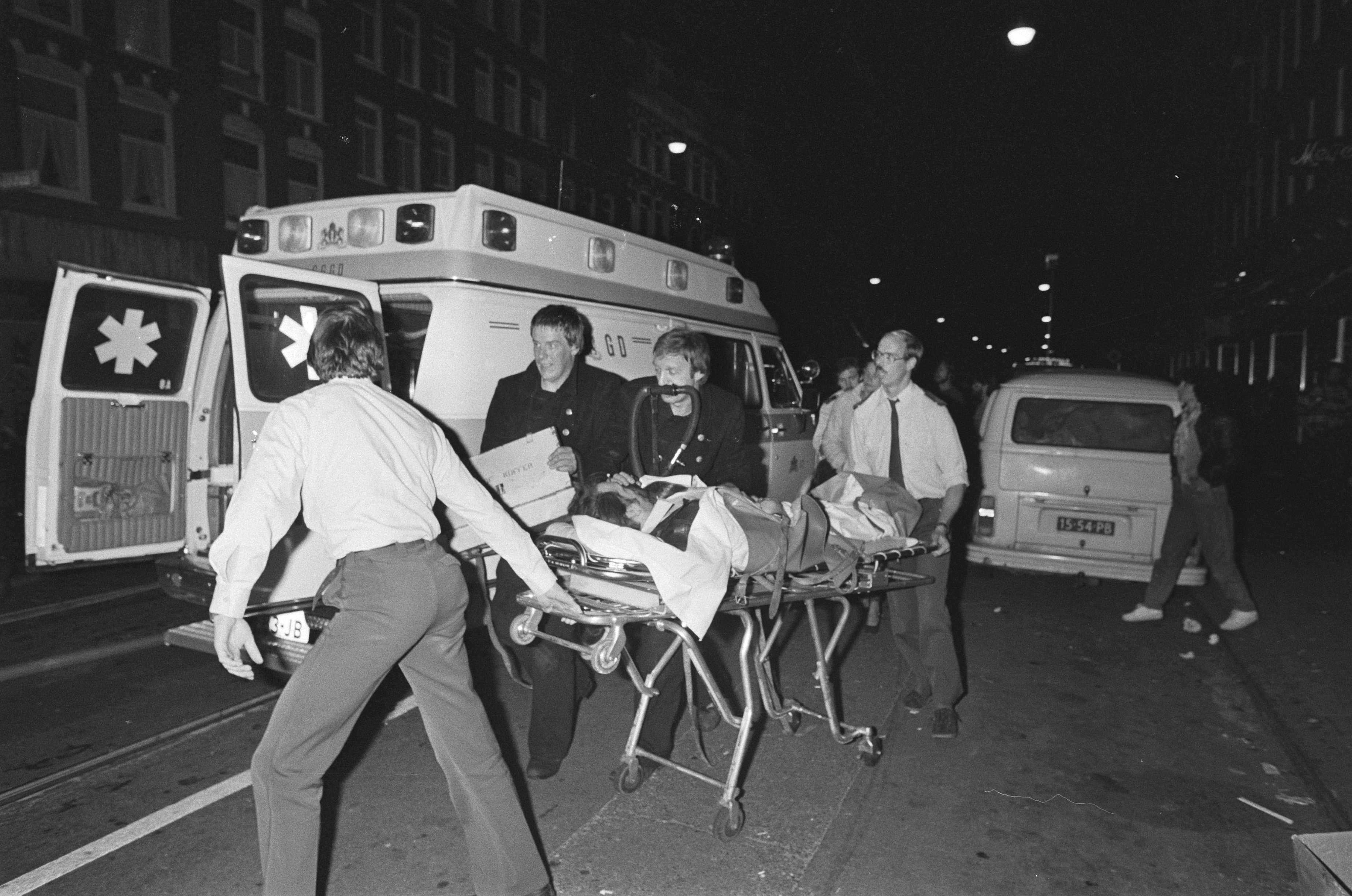 Collectie / Archief : Fotocollectie Anefo Reportage / Serie : Brand in pand in Kinkerstraat te Amsterdam met 4 gewonden Beschrijving : Gewonden met ambulance weggehaald Datum : 26 september 1980 Locatie : Amsterdam, Noord-Holland Trefwoorden : ambulances, branden, gewonden Fotograaf : Dijk, Hans van / Anefo Auteursrechthebbende : Nationaal Archief Materiaalsoort : Negatief (zwart/wit) Nummer archiefinventaris : bekijk toegang 2.24.01.05 Bestanddeelnummer : 931-0425